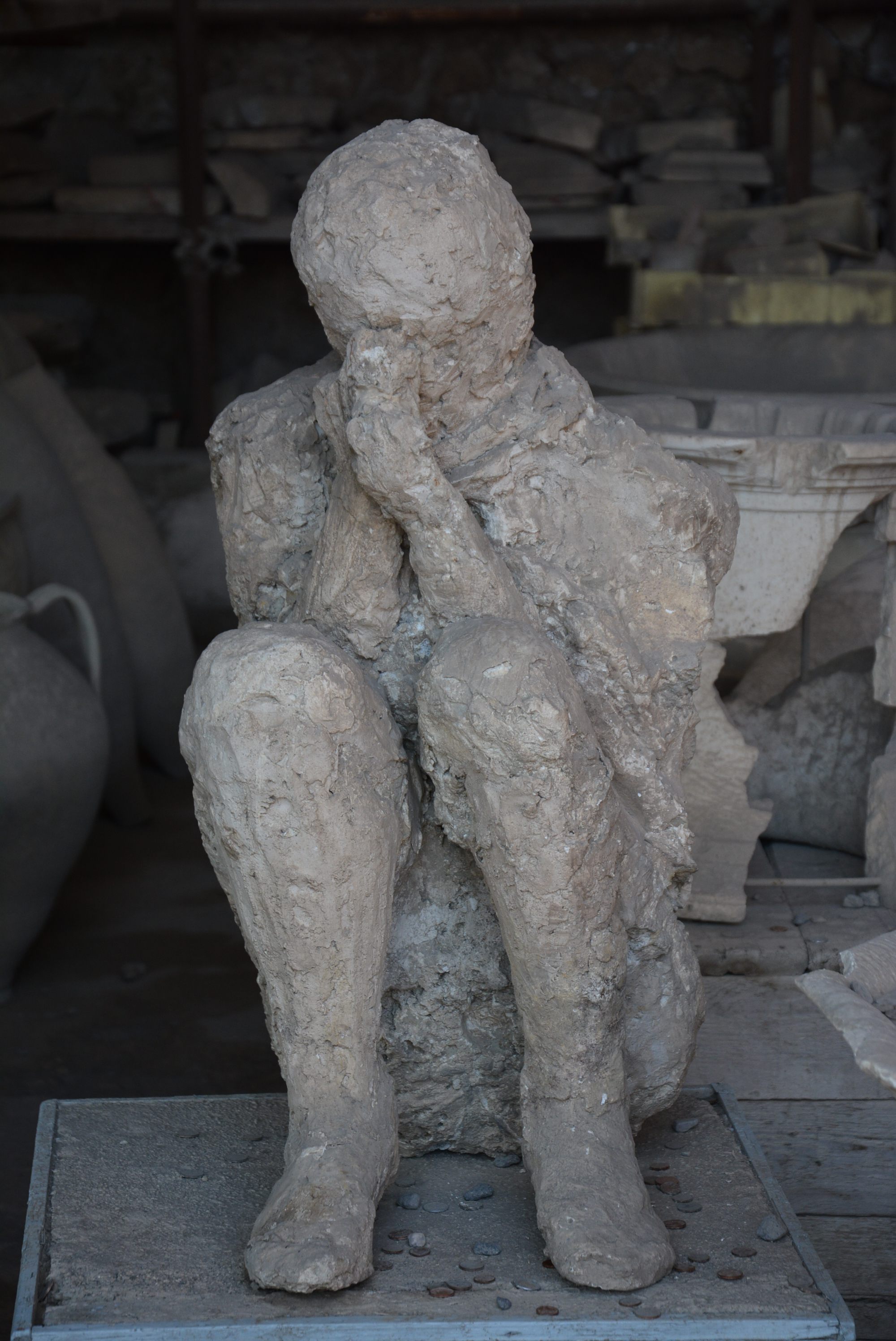 Granai del Foro - MIBACT This is a photo of a monument which is part of cultural heritage of Italy.